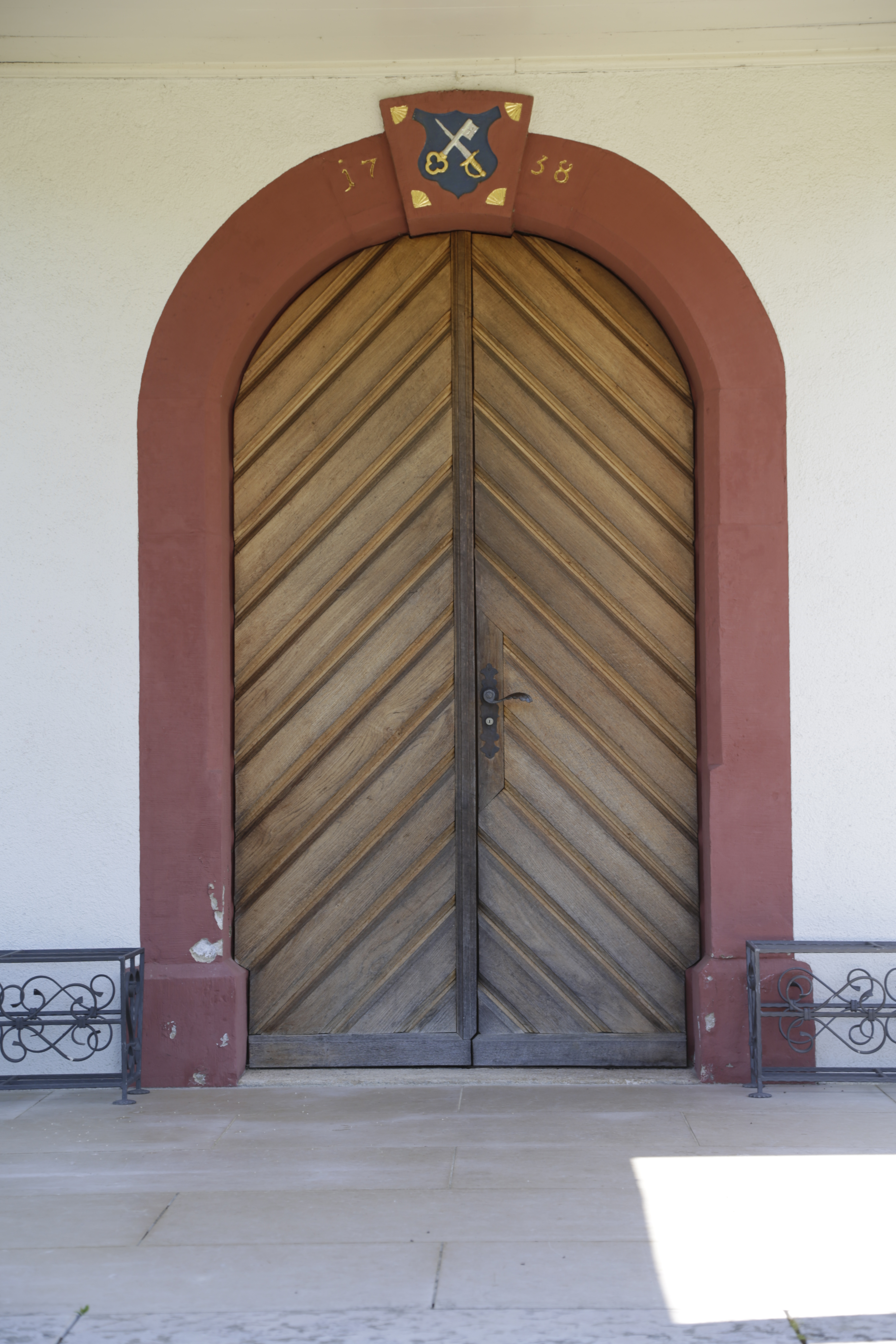 Das Hauptportal der christkatholichen Kirche von Obermumpf